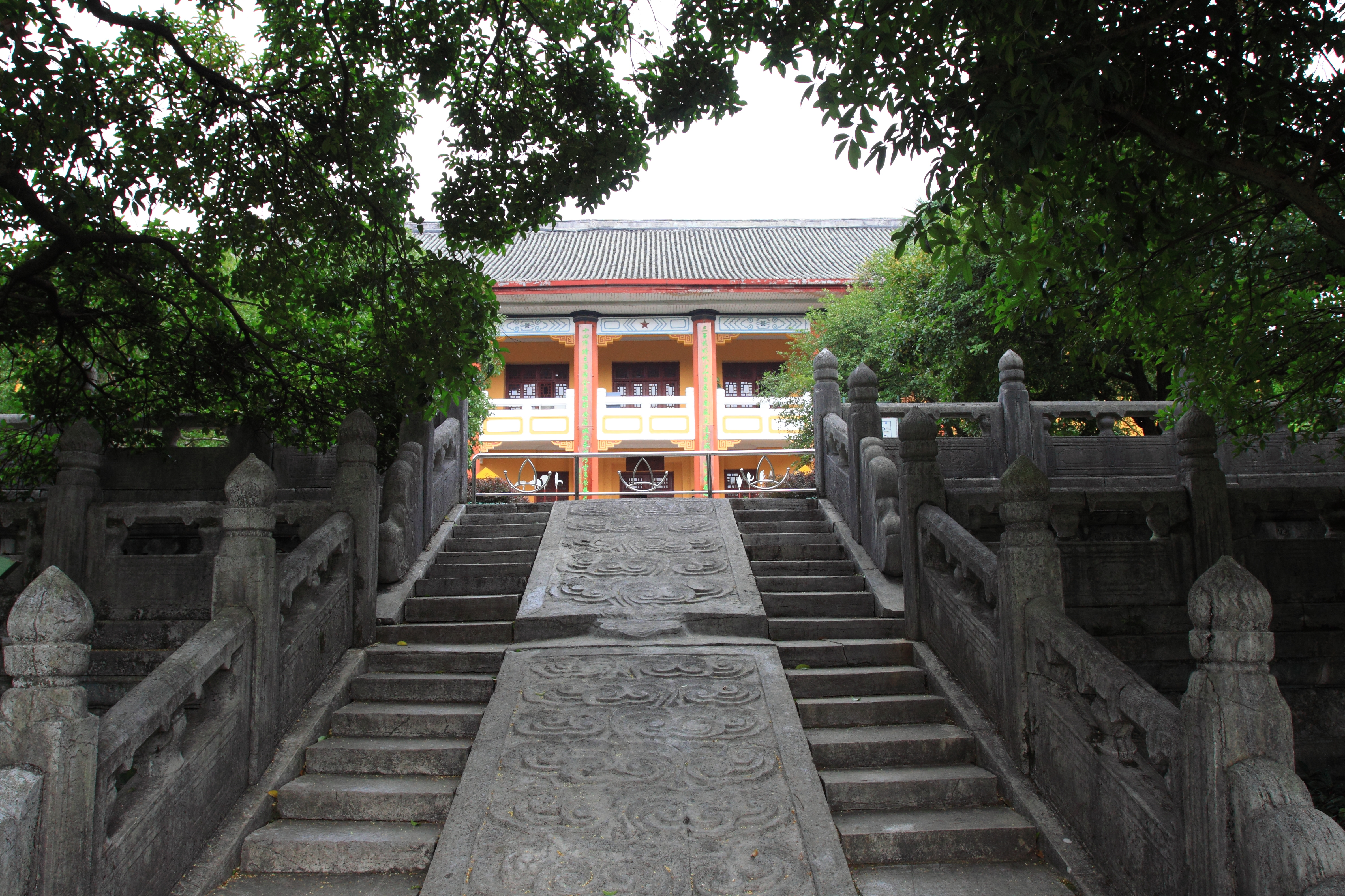 靖江王府寝宫遗址——台基